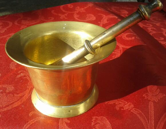 Almirez y mano de bronce, liso sin decoración frontal. Español del S XVIII